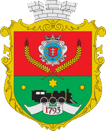 Герб Апостолівського району